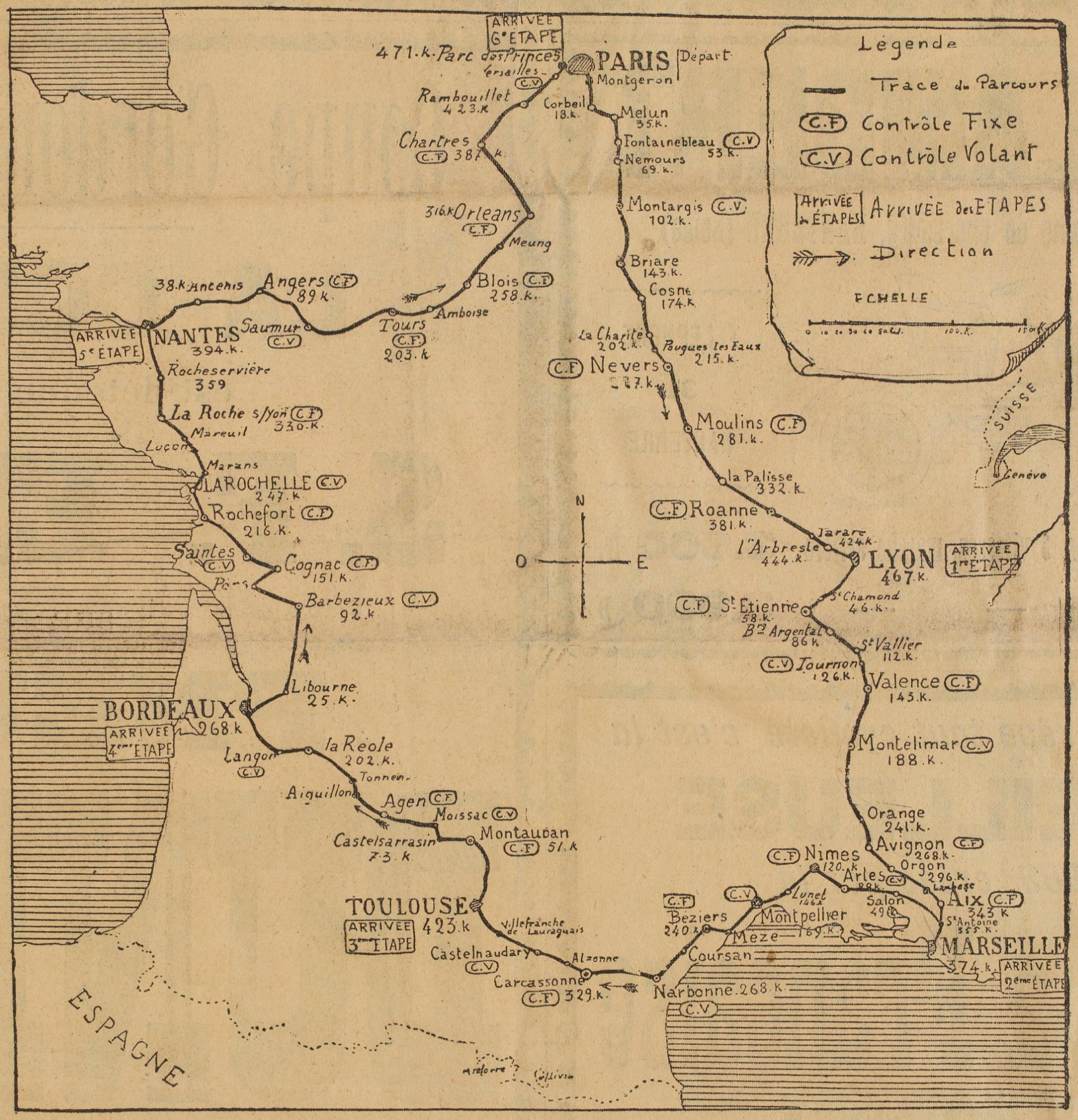 L'itinéraire du premier Tour de France cycliste, en juillet 1903.